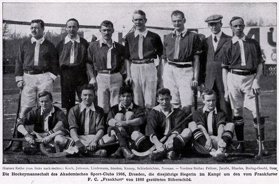 Hockeymannschaft des Akad. Sport-Clubs 1906, Dresden, nach dem Gewinn des Silberschilds, Ostern 1908 Endspiel: ASC Dresden 1906 3:2 (1:1) FC Frankfurt 1880